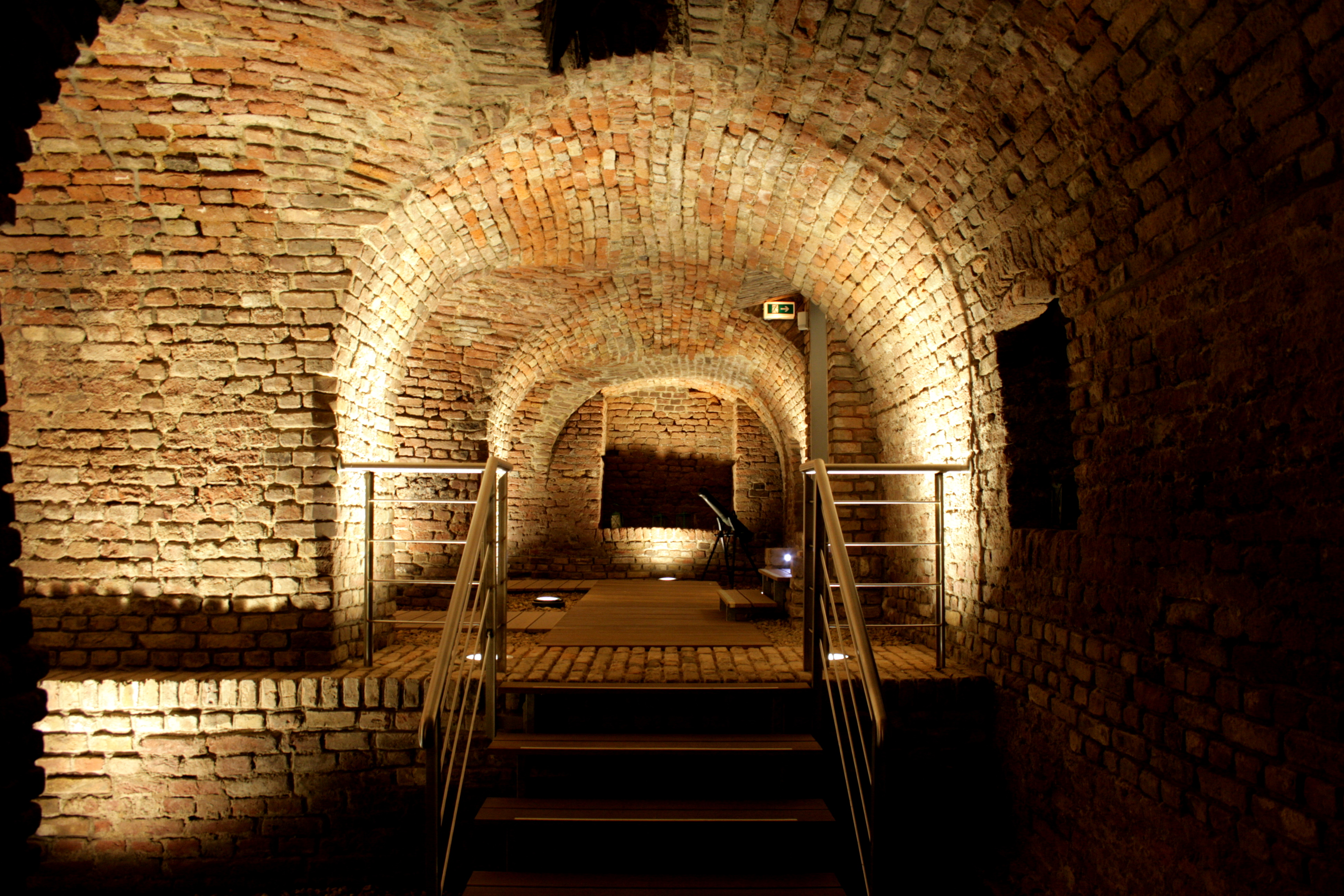 Kasematten unter dem Städtischen Museum Koenraad Bosman im Gebäude Keim, Am Bär 1 in Rees